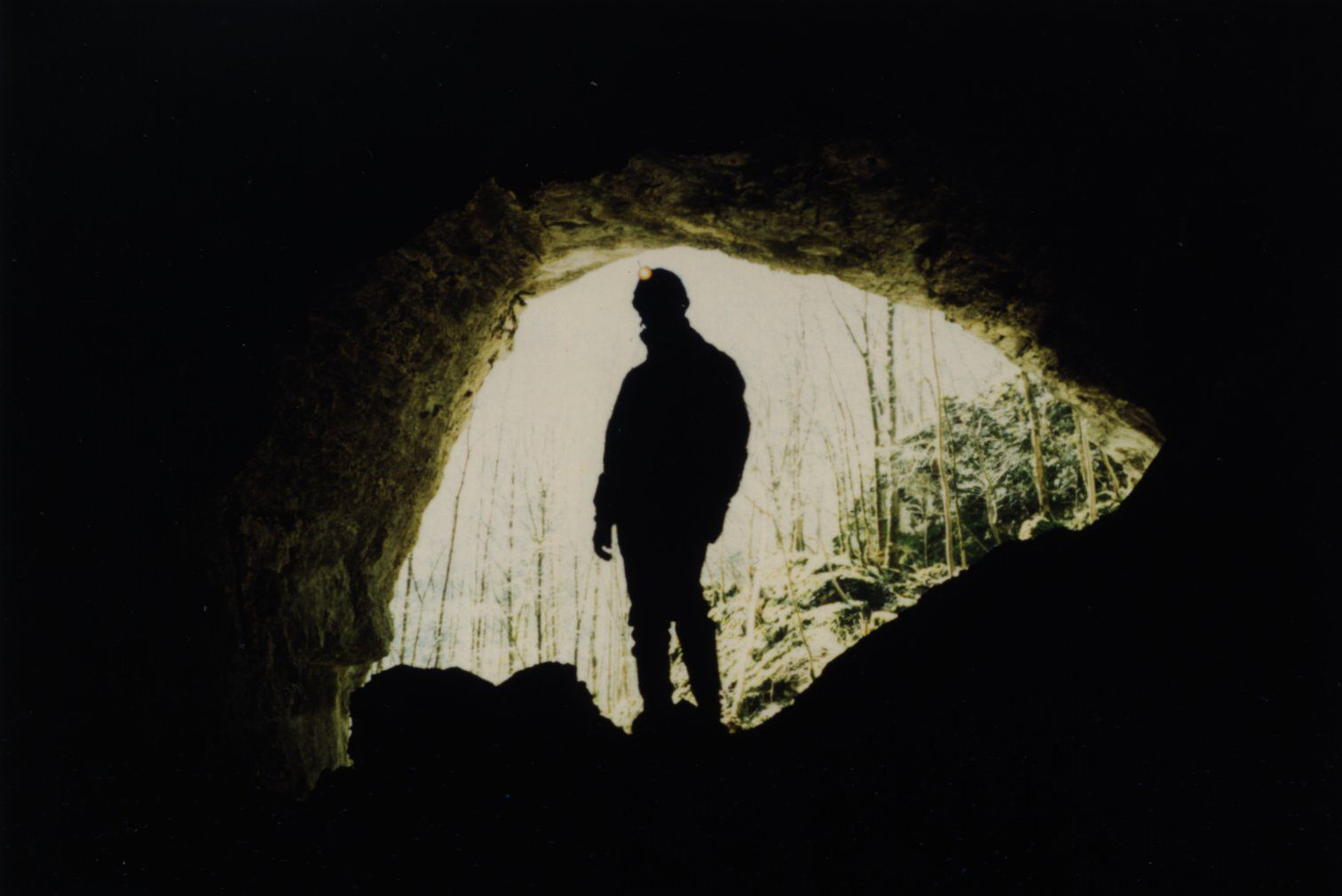 Grotte des Faux-Monnayeurs, Suisse.